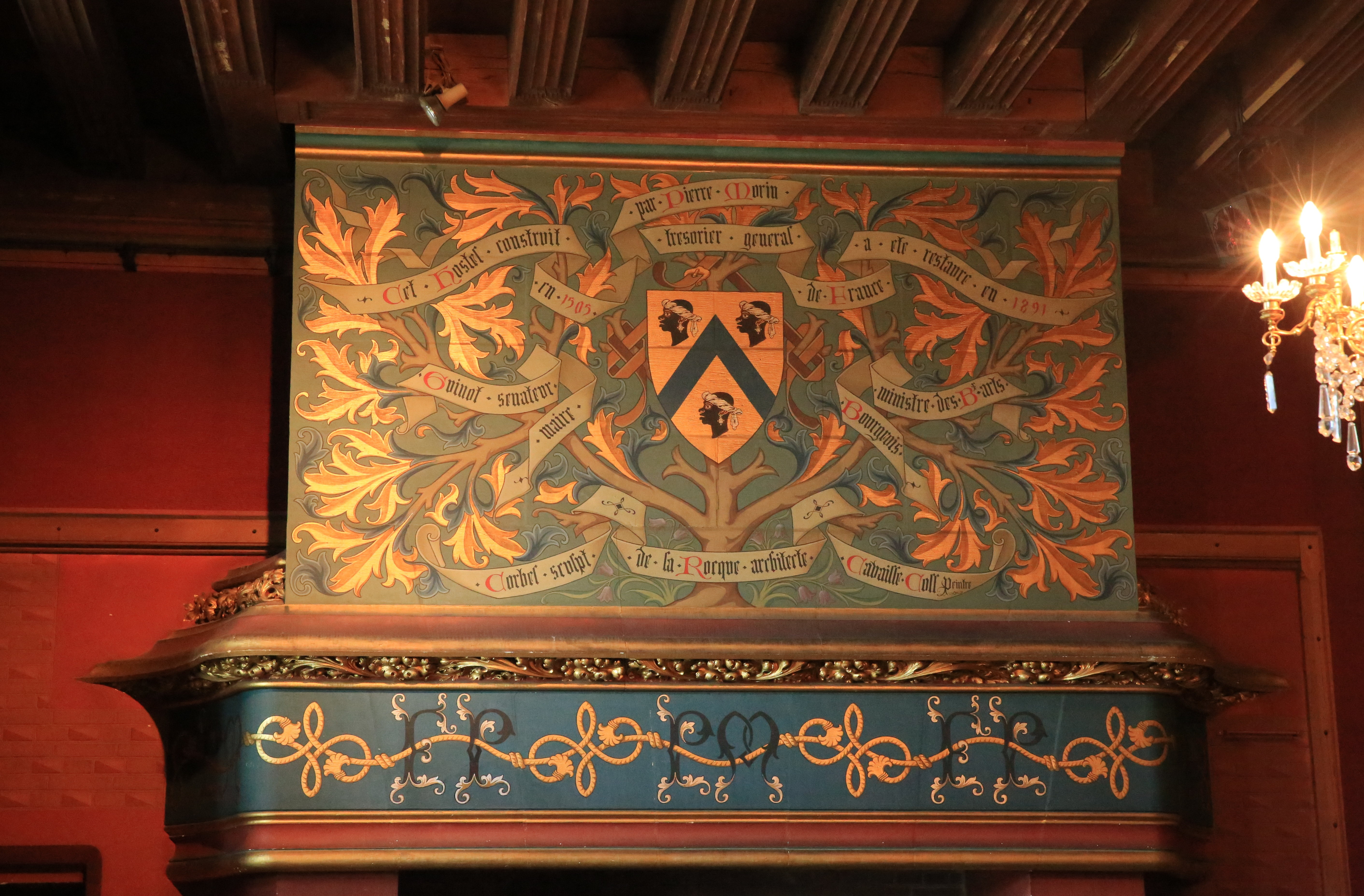 "Cet hostel construit en 1505 par Pierre Morin, Trésorier général de France a été restauré en 1891 : Bourgeois ministre des Beaux-Arts, Guinot sénateur-maire, Corbet sculpteur, de la Rorque architecte, Cabaille Coffre peintre".